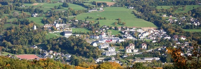 Vue du chef lieu depuis Corsuet